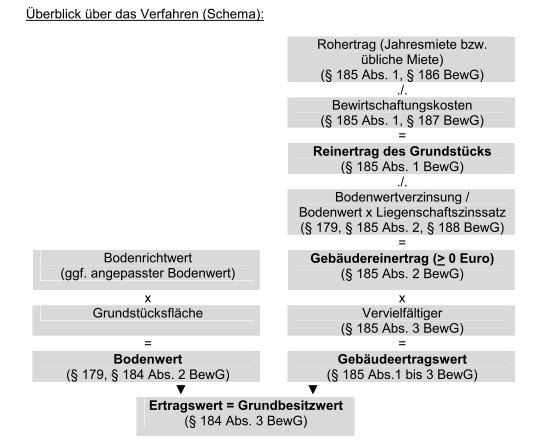 Darstellung des Ertragswertverfahrens lt. Bewertungsgesetz aus Erlass Finanzminister der Länder